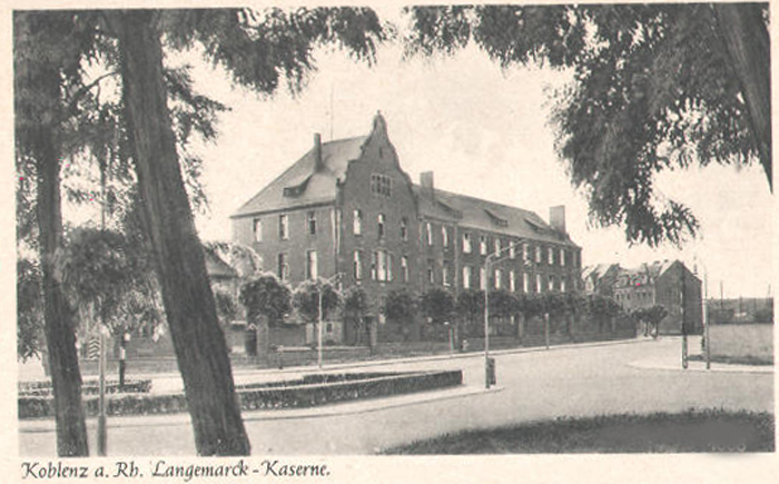 Langemarck Kaserne in Koblenz vor der Zerstörung